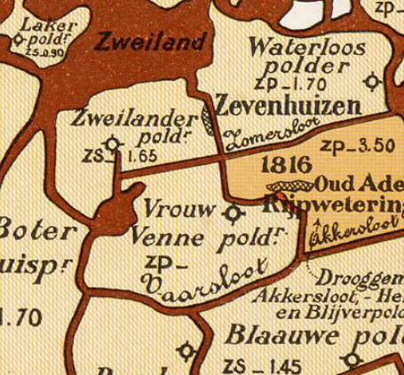 Vrouw_Vennepolder